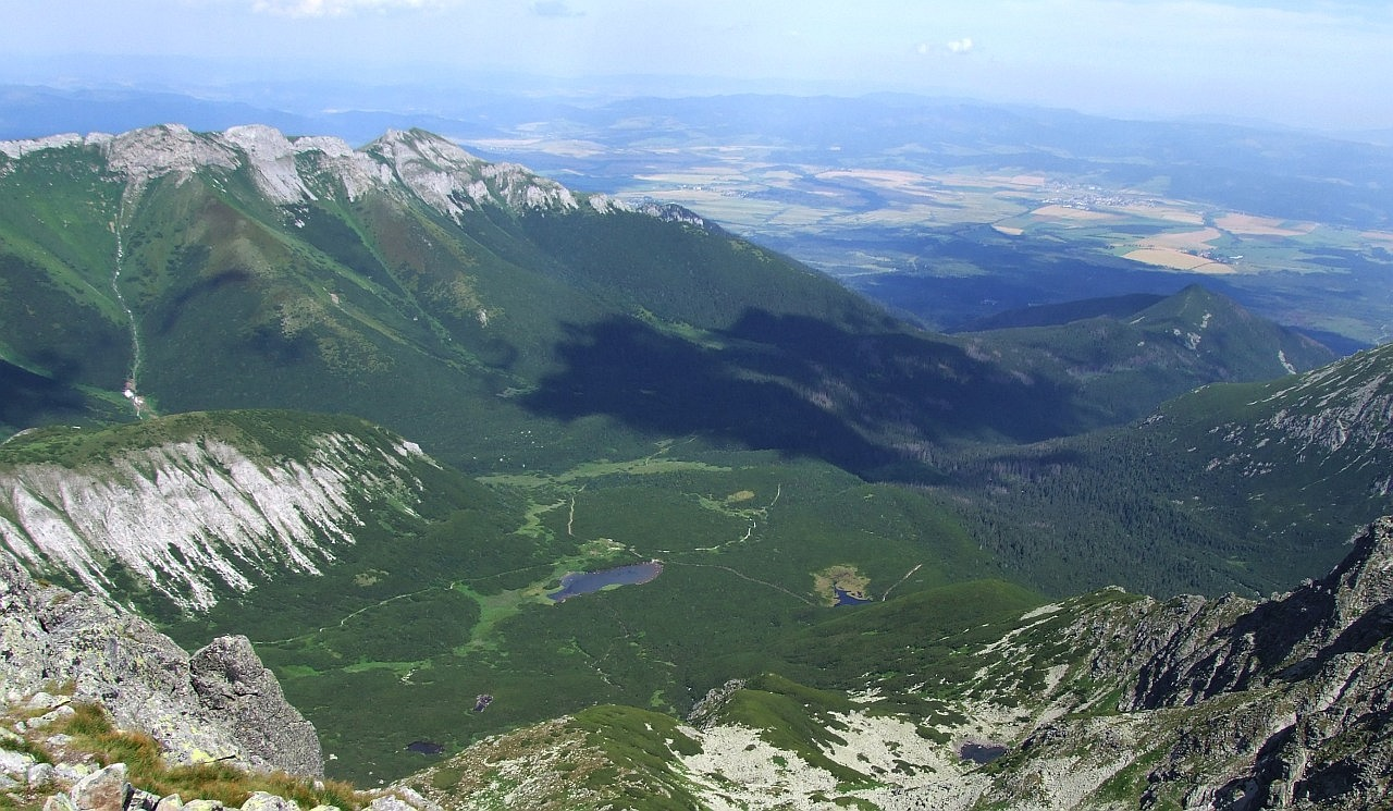 Dolina Białych Stawów i Dolina Kieżmarska. Widok z Jagnięcego Szczytu. Z tyłu Zadnie Jatki i Bujaczy Wierch